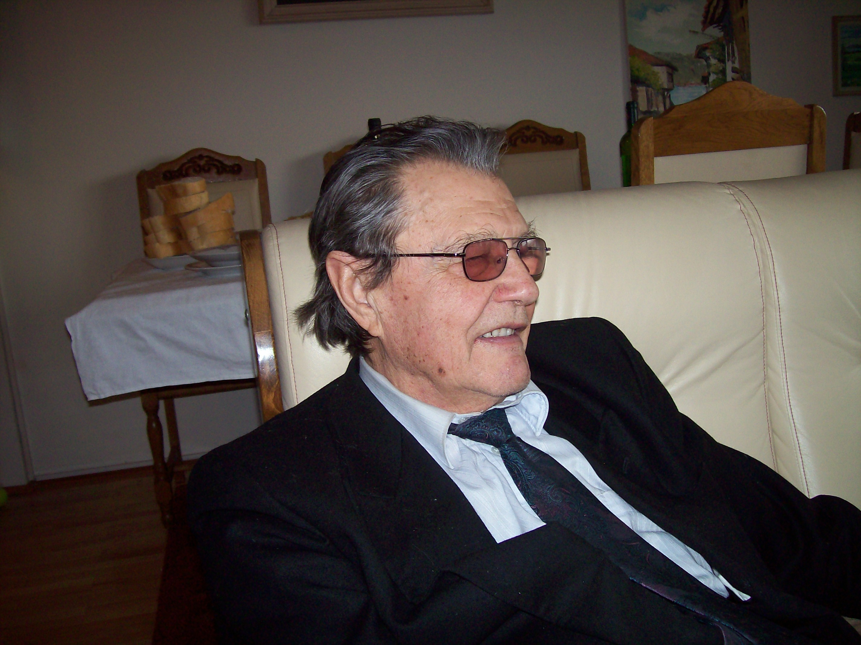 Ташко Белчев.